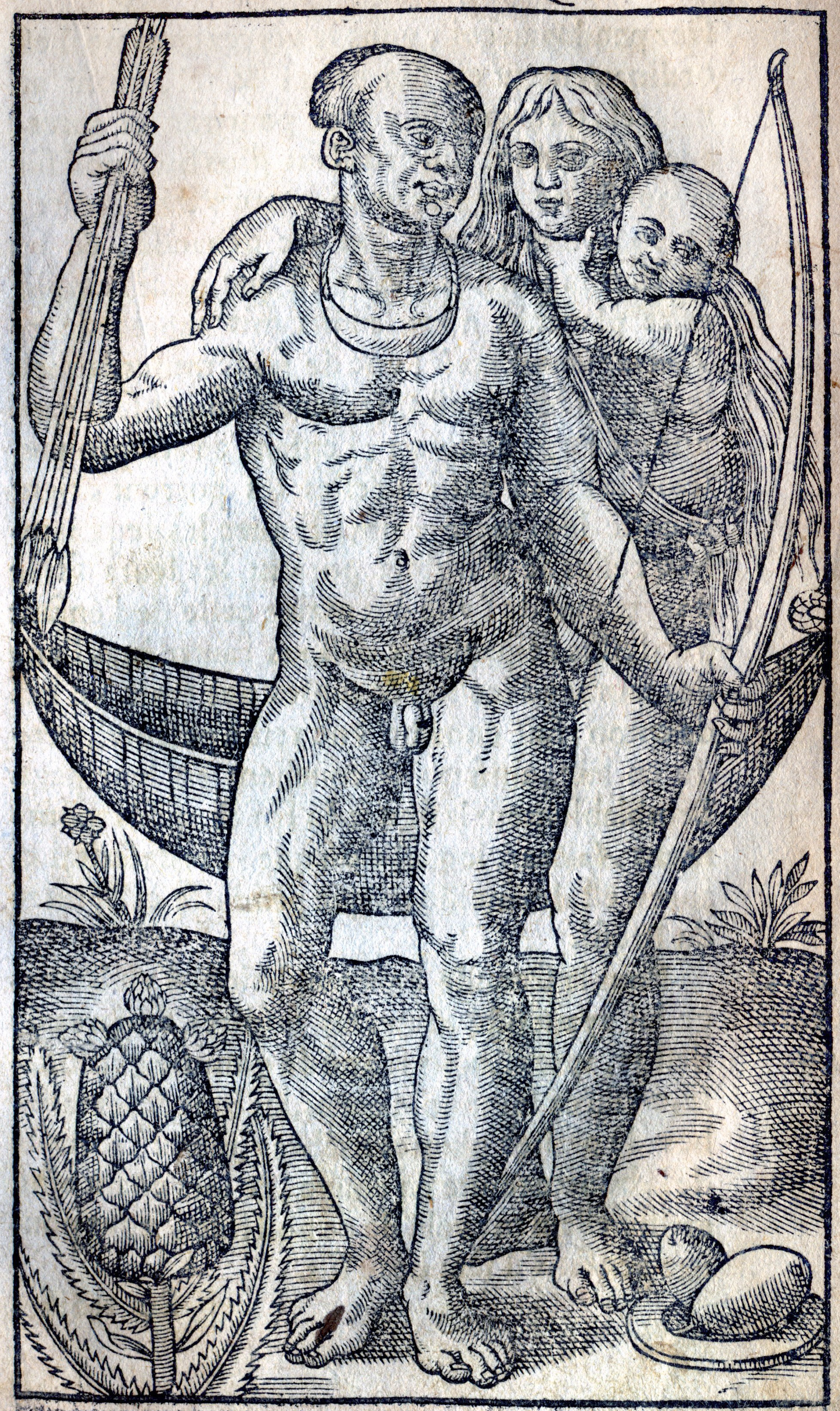 Gravure illustrant l' Histoire d'un voyage fait en la terre du Brésil, de Jean de Léry : Famille d'Amérindiens du Brésil